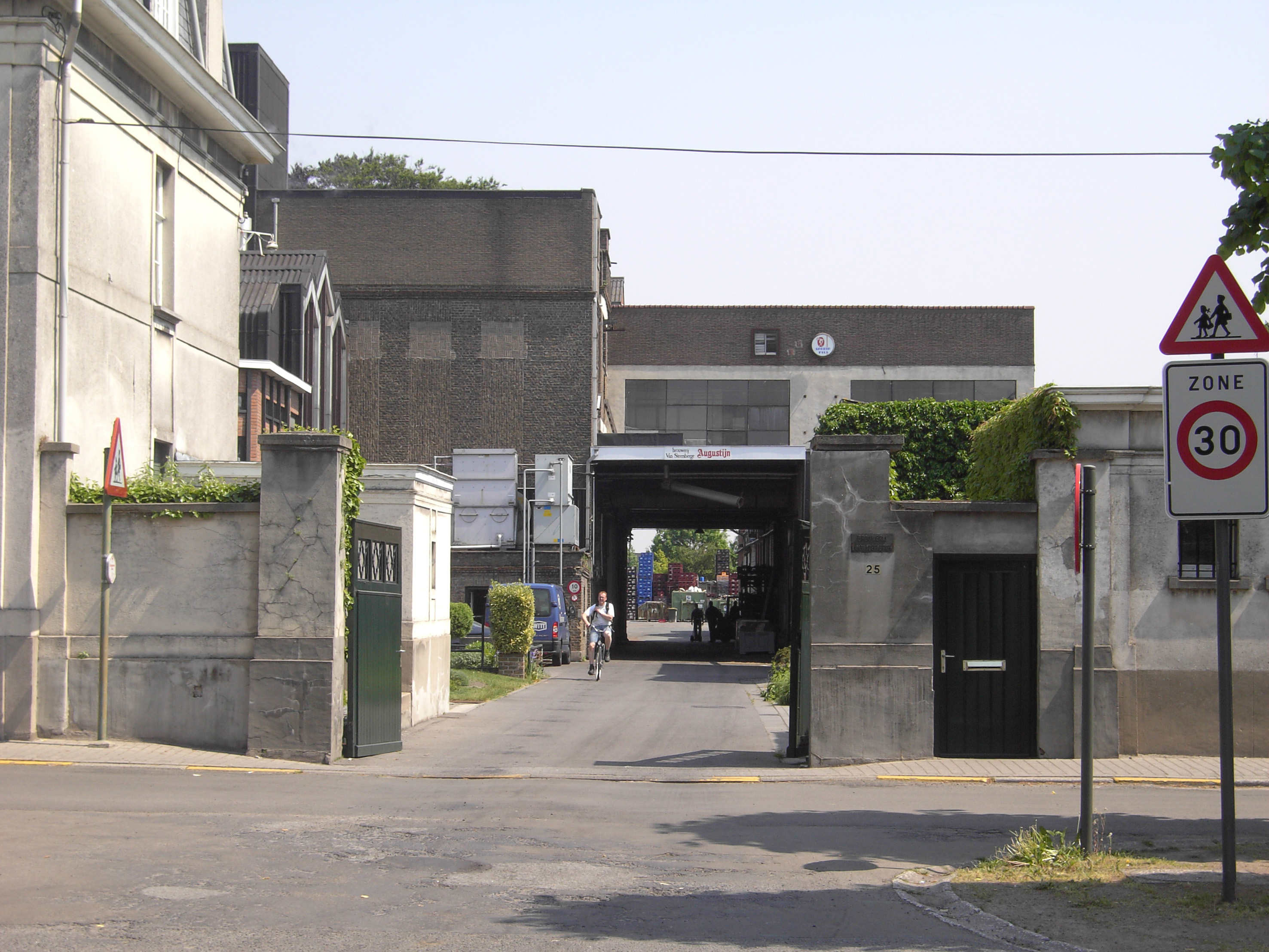 Ertvelde - Evergem - Brouwerij Van Steenberghe